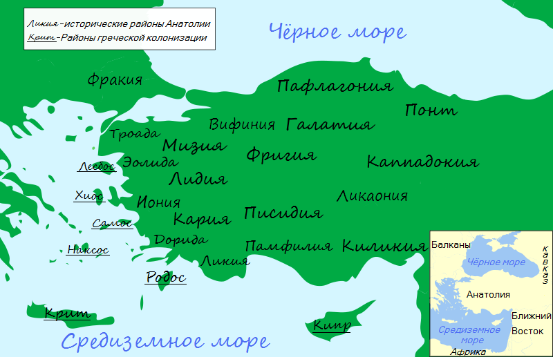 Исторические регионы Анатолии